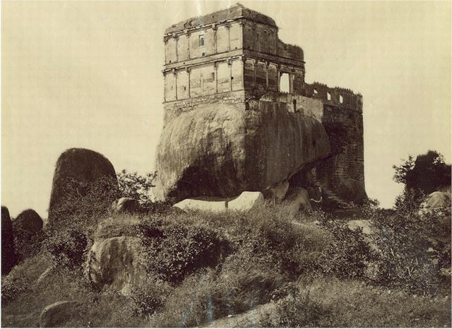 Madan Mahal, the palace of Rani Durgavati in Jabalpur, India. c.1865.